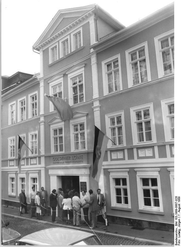 Eisenach, Gedenkstätte "Goldener Löwe" ADN-ZB Ludwig-7.8.89-mx Bez. Erfurt: Gedenkstätte-Im "Goldenen Löwen" in Eisenach wurde die Nationale Gedenkstätte zum Eisenacher Kongreß anläßlich der 120. Wiederkehr dieses bedeutsamen Ereignisses wiedereröffnet. 200 Delegierte hatten auf diesem Kongreß am 8.-9. August 1869 den Zusammenschluß der sozialdemokratischen Arbeiter Deutschlands beschlossen.